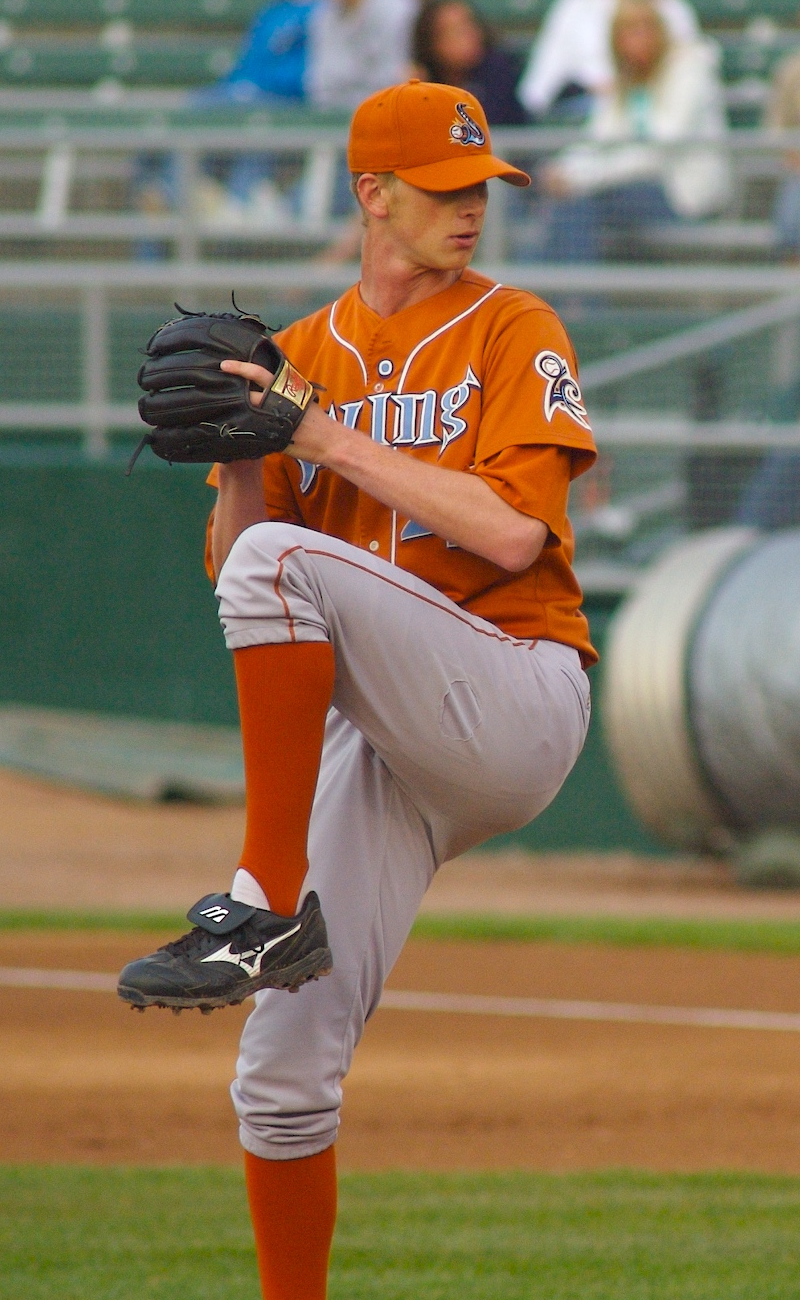 Brandon Dickson